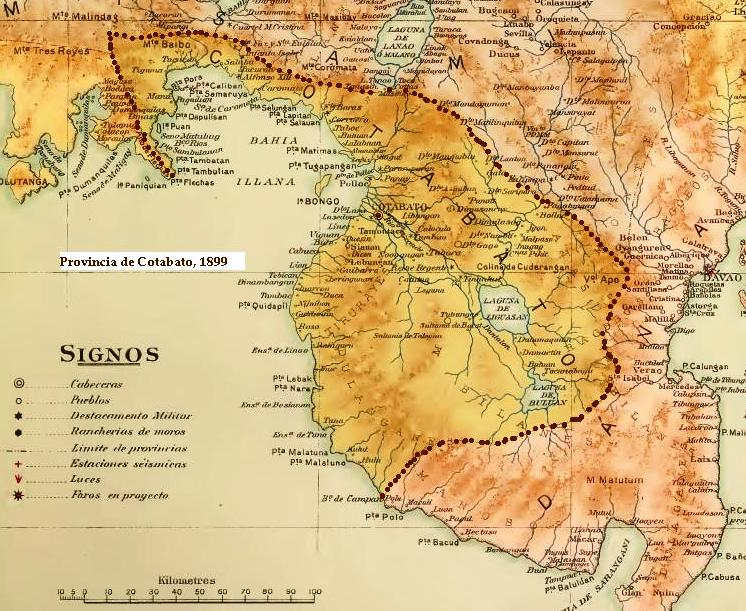 Fragmento del mapa de la página 81 del Atlas